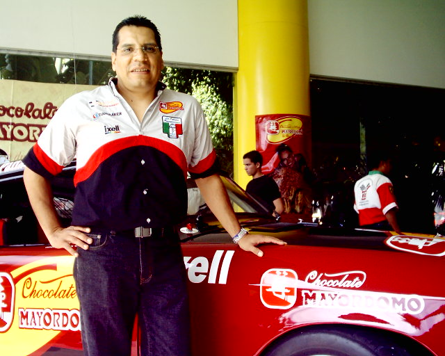 Juan Carlos Sarmiento durante la presentación de su automóvil de competencia en octubre de 2004.